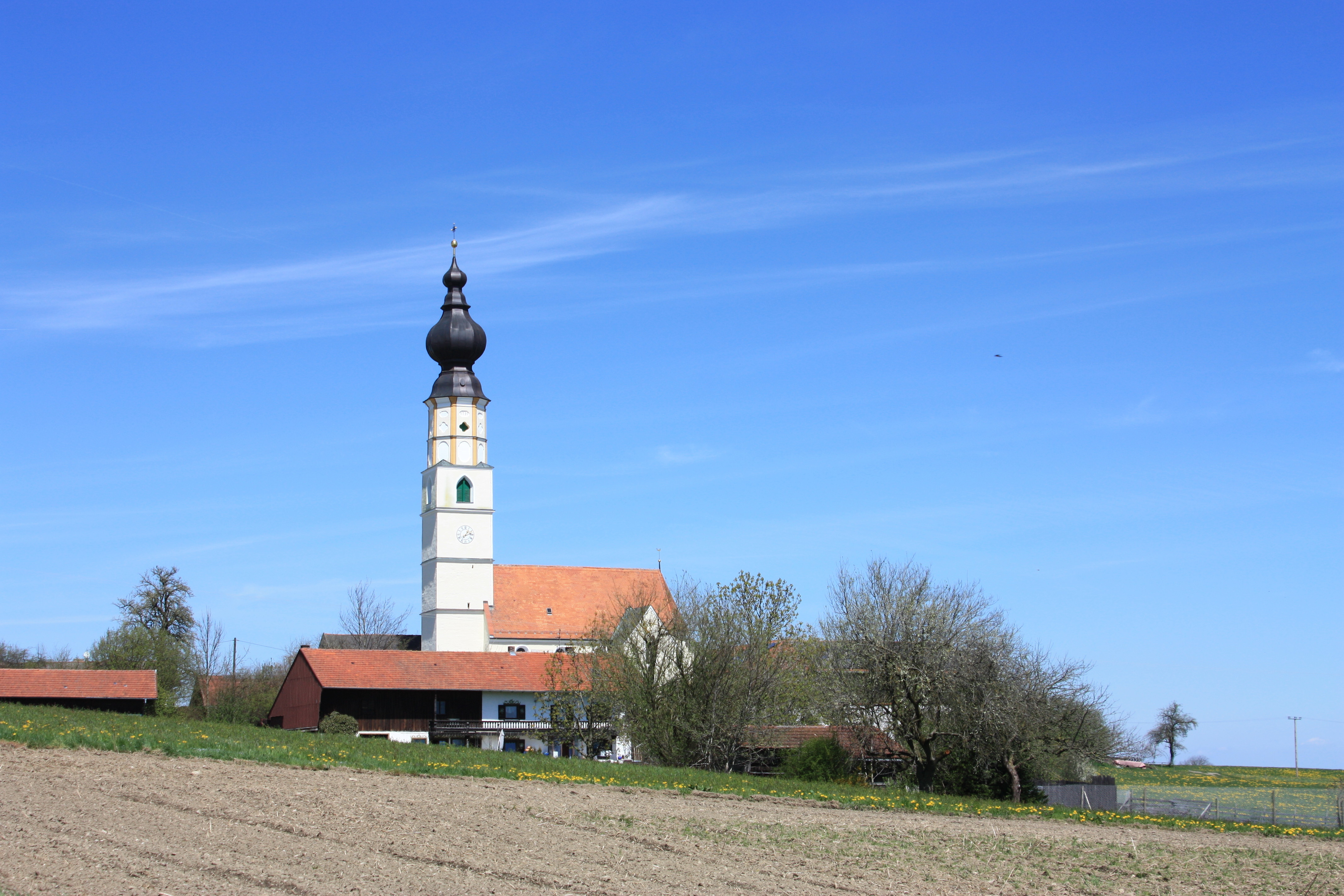 Obing OT Albertaich